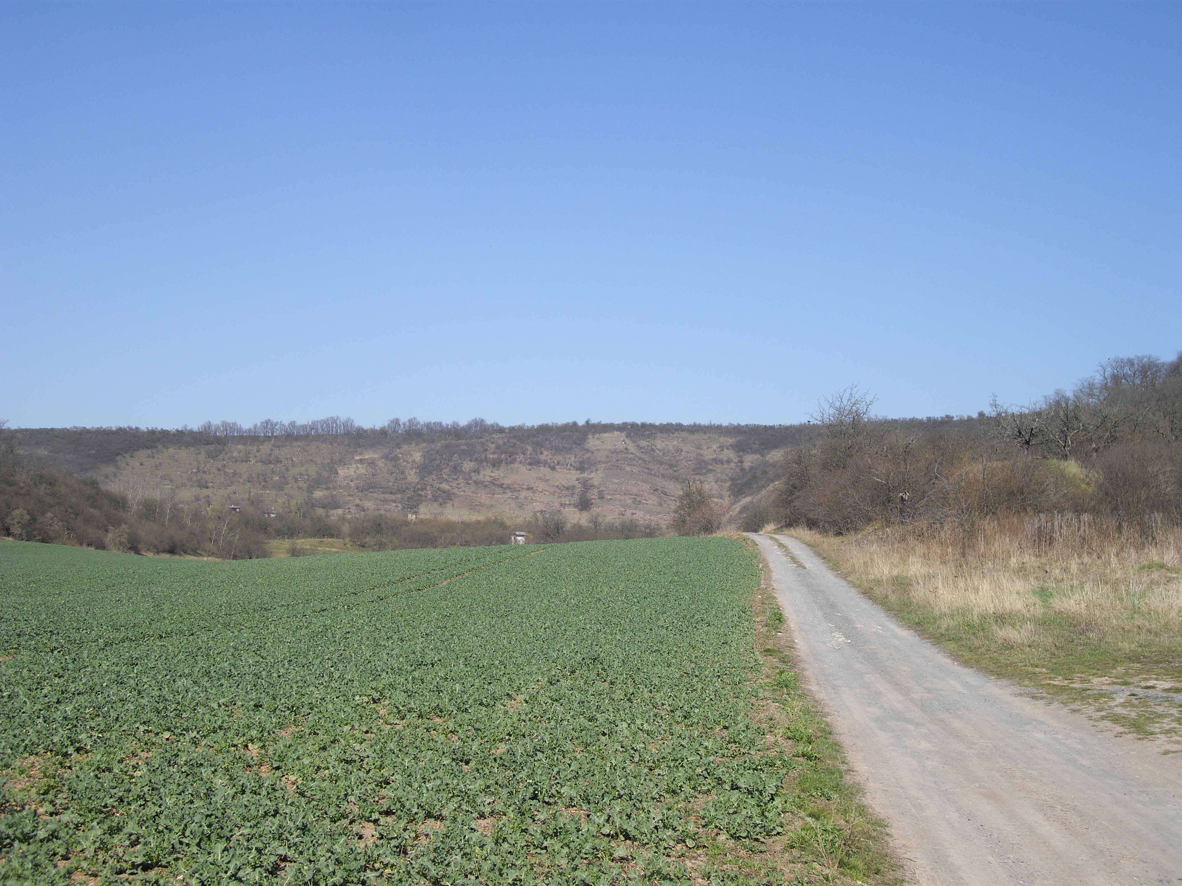 der Steilhang Riß zwischen Wormsleben und Hedersleben im Mansfelder Land